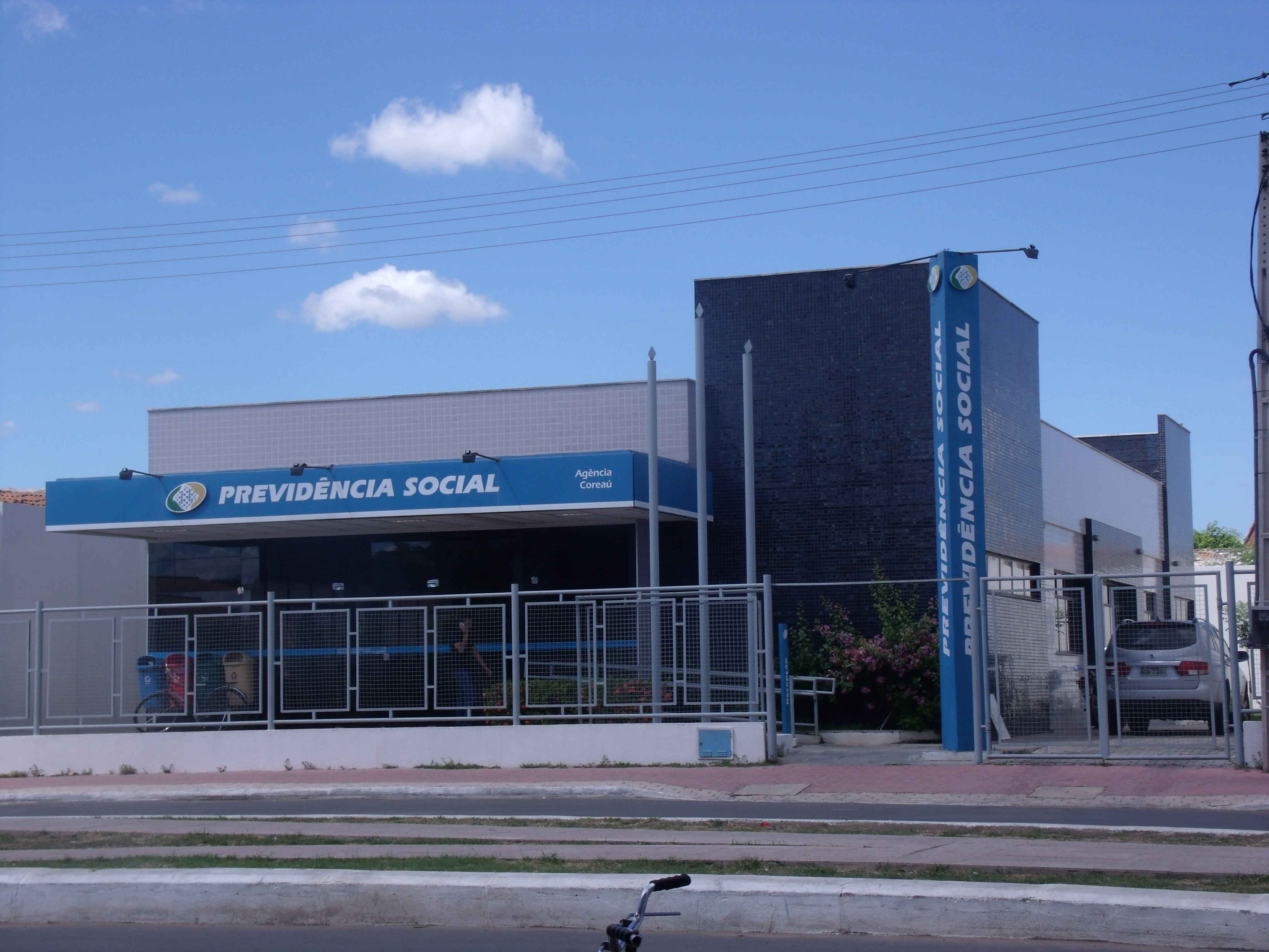 Agência do INSS, Previdência Social, em Coreaú, Ceará.